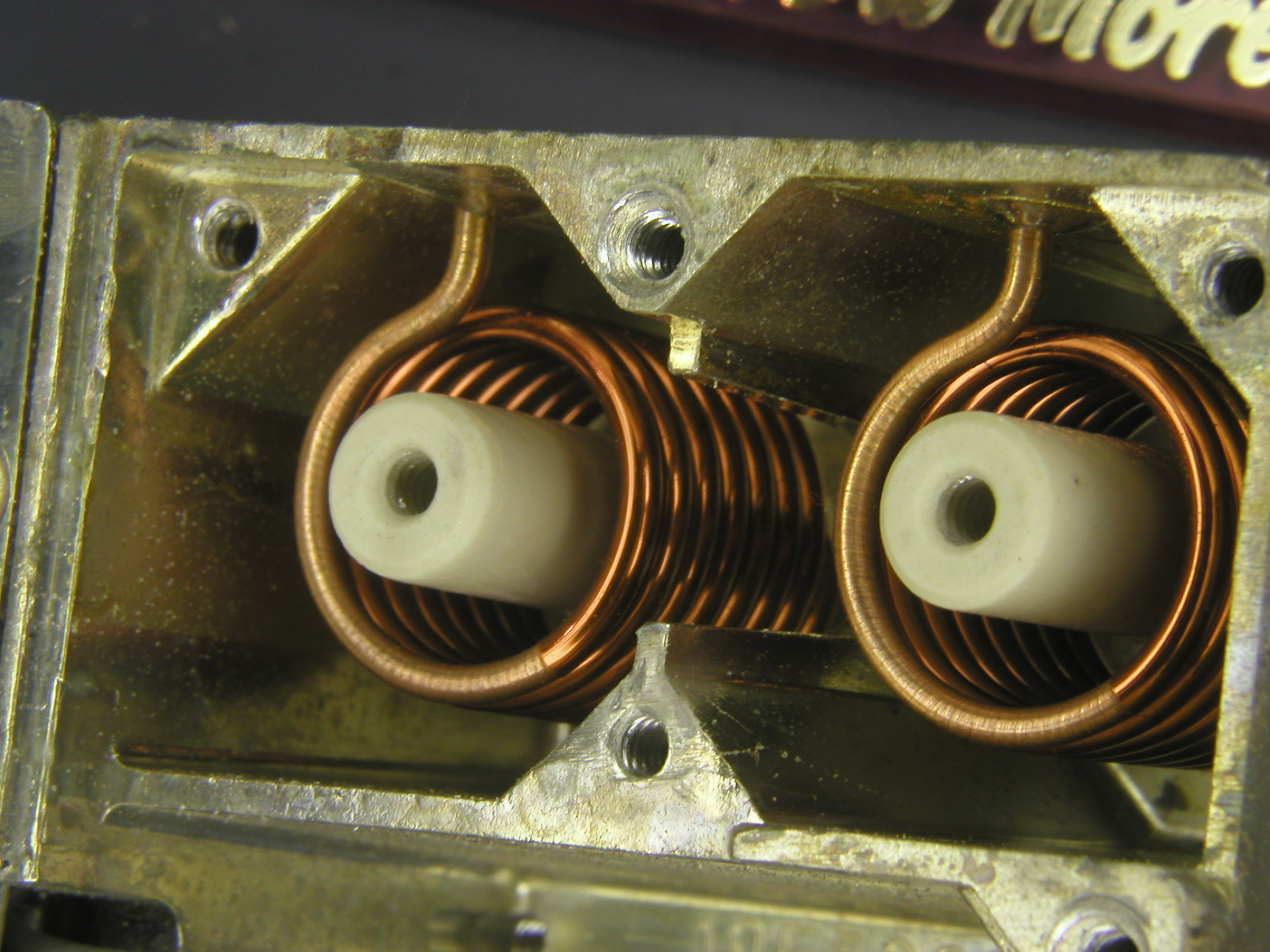 Helical resonator filter